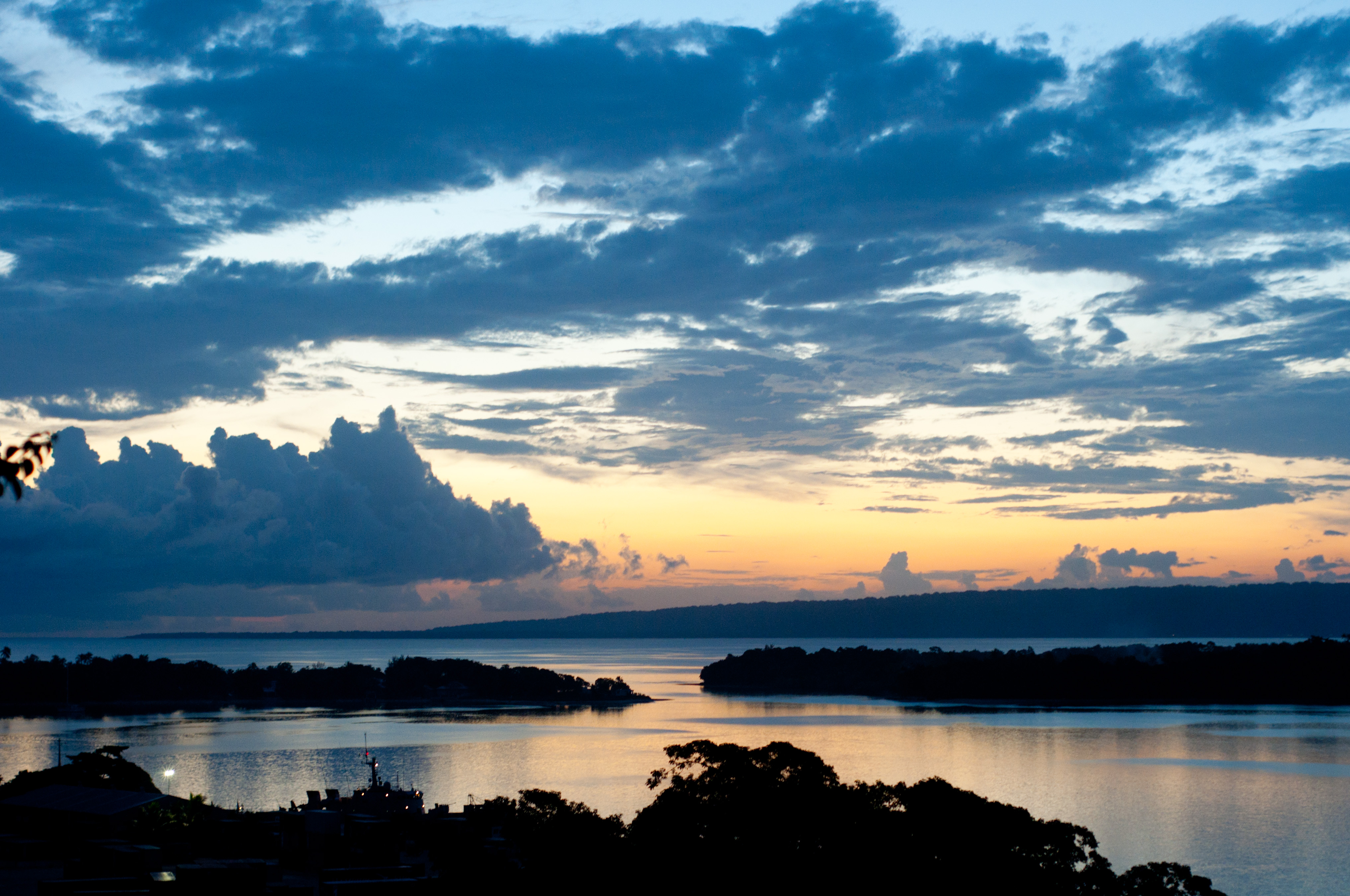 Port Vila Harbour